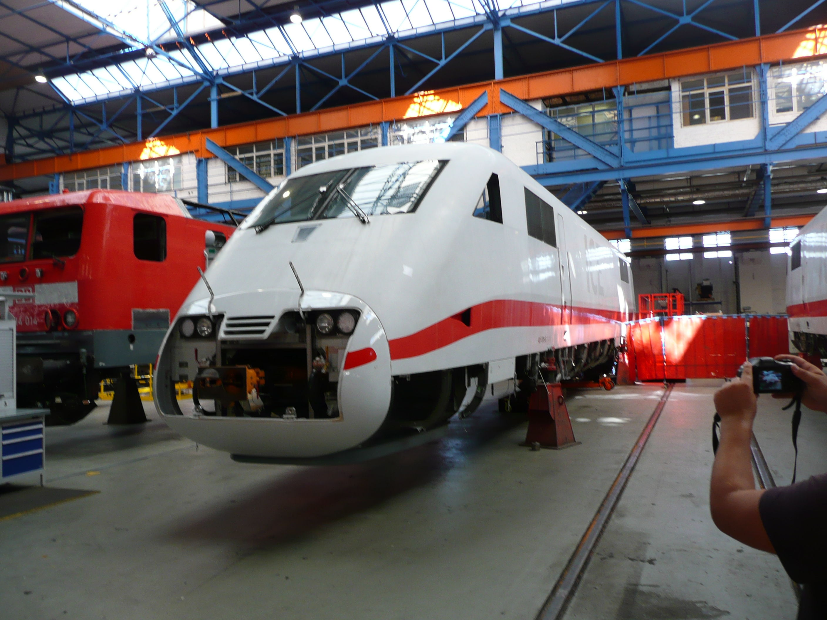 Triebkopf der BR 401 in der Richthalle1 des AW Dessau